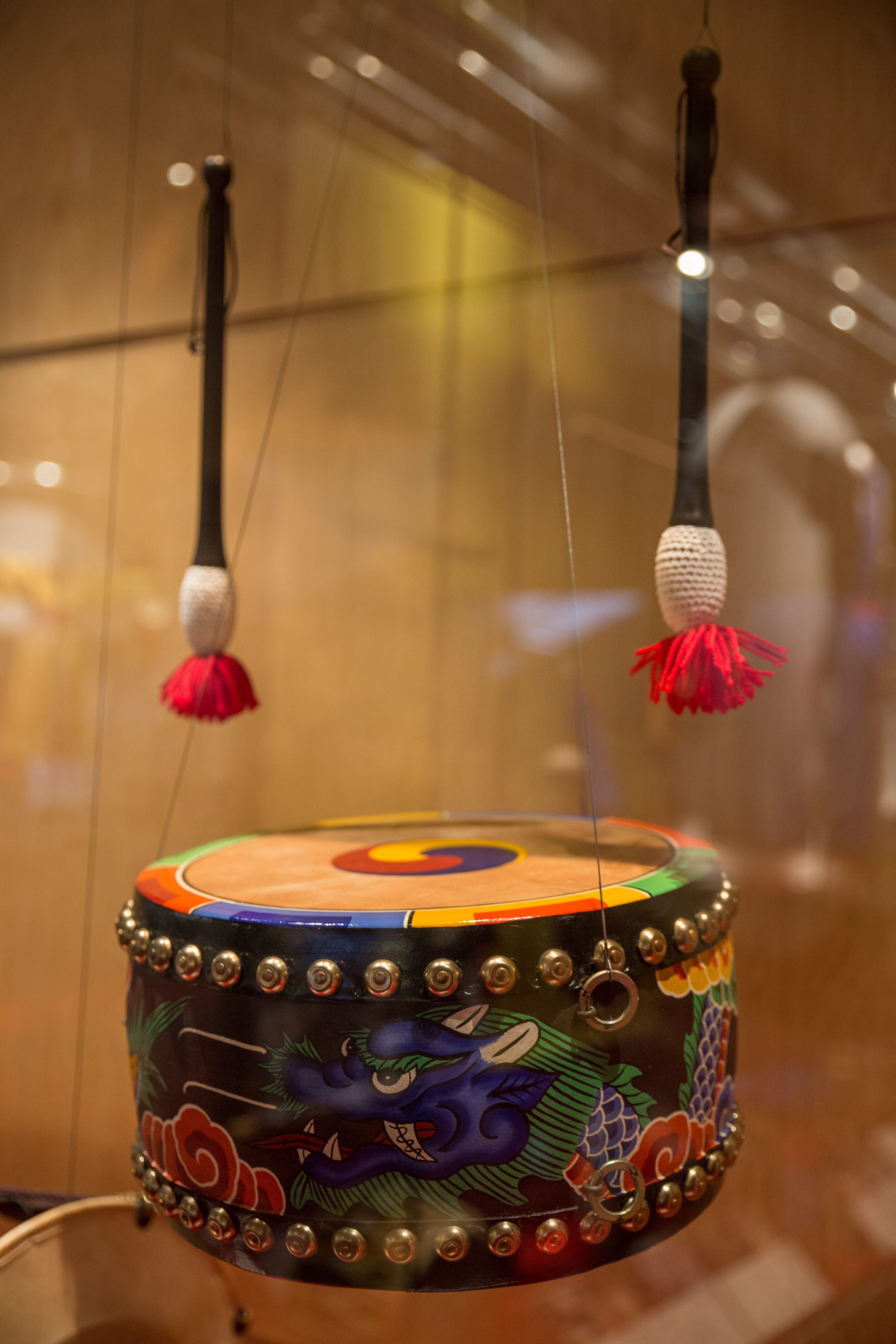 Yonggo, exposat a Eolssigu! Els sons de Corea